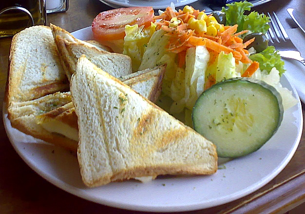 Tramezzini on a plate